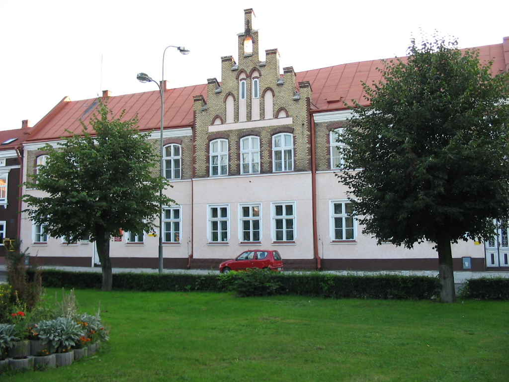 Biblioteka Pedagogiczna w Lubaczowie